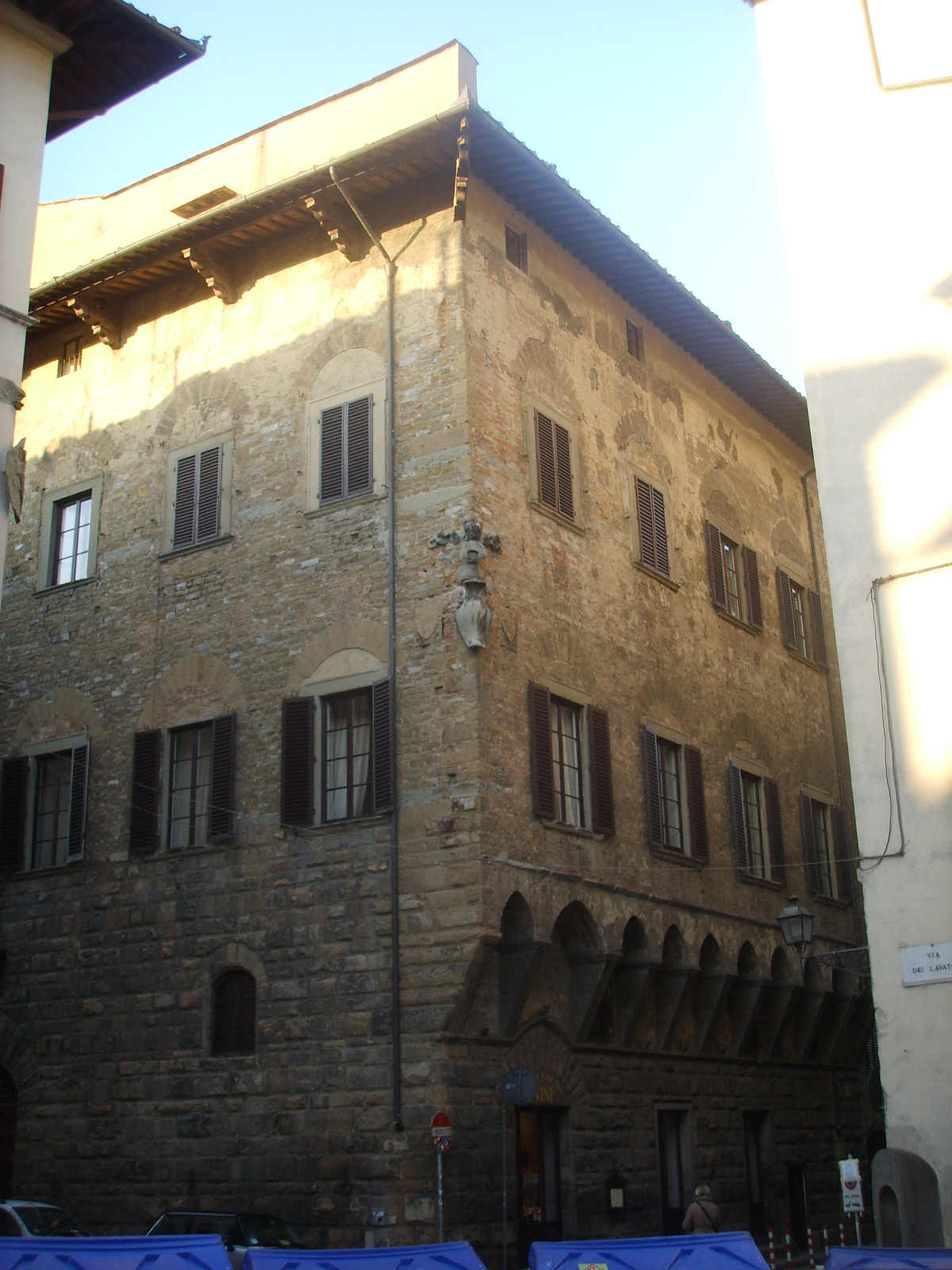 Palazzo_Da_Cintoia in Florence, Italy